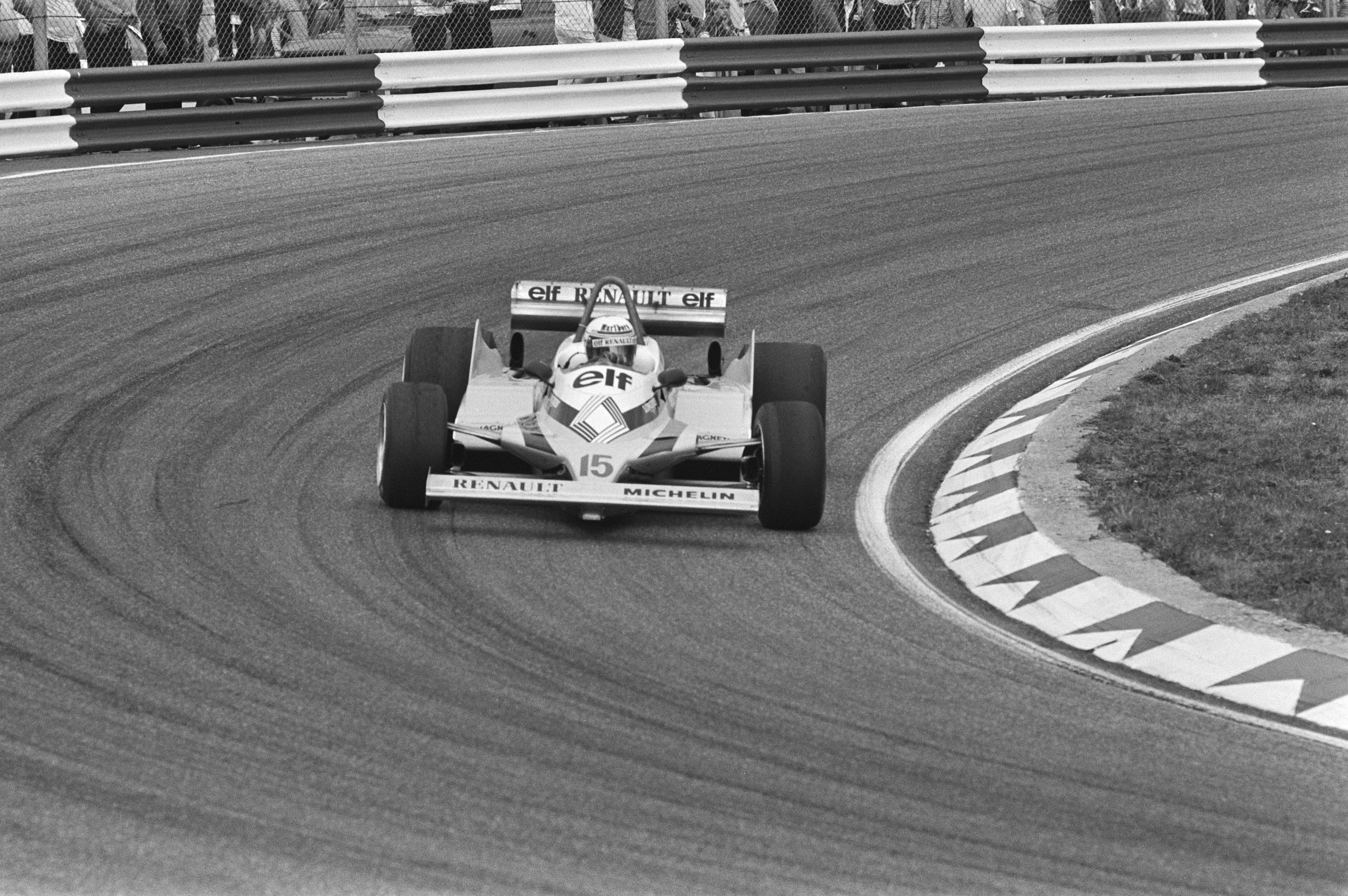 De Franse autocoureur Alain Prost in aktie in zijn Renault Formule 1 wagen tijdens de Grand Prix Formule 1 op zandvoort.